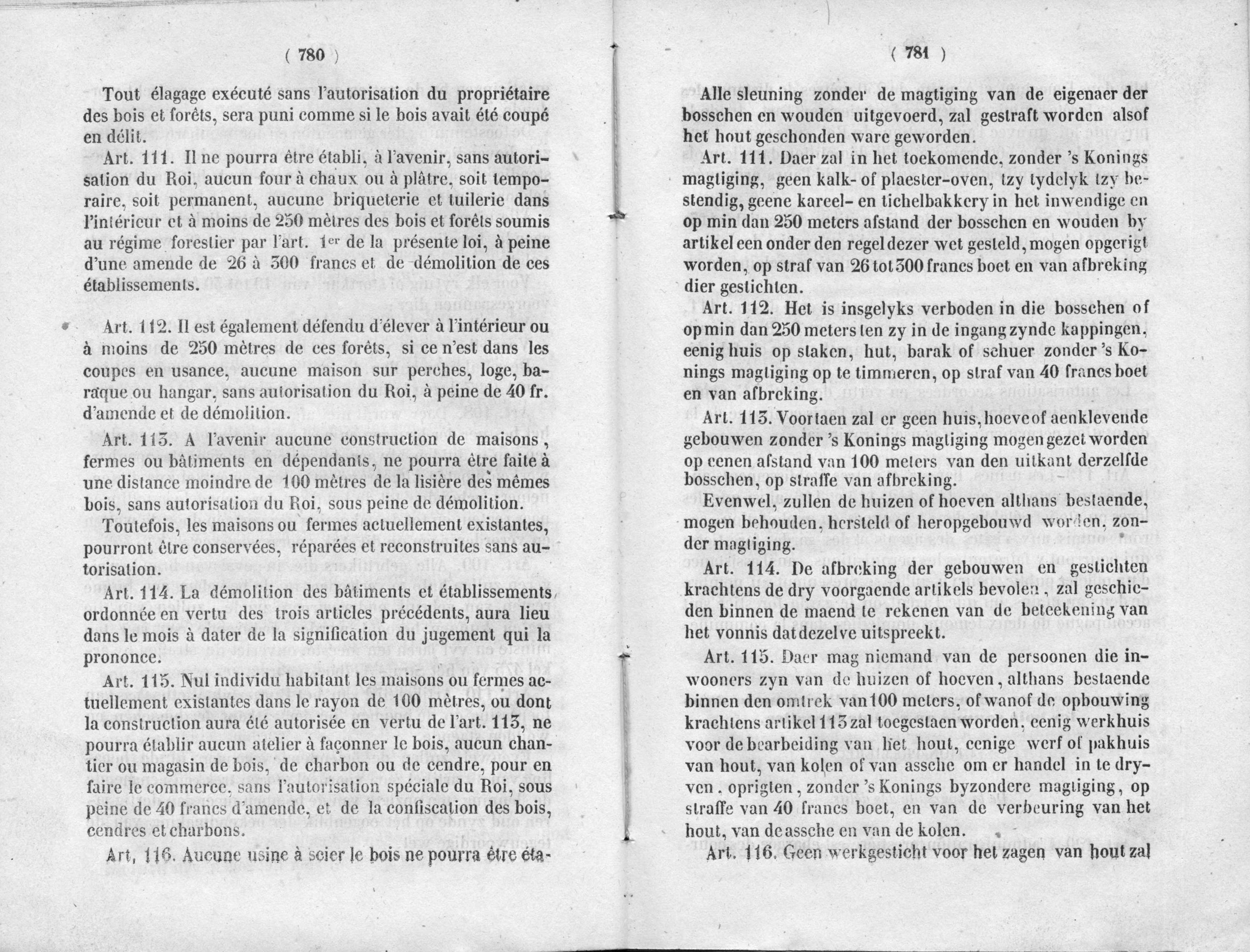 Blad uit Boswetboek (België) van 1854